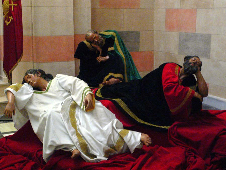 Apóstoles durmientes Único resto superviviente del antiguo grupo de la Oración del Huerto creado por Francisco Salzillo en el s.XVIII para la cofradía de los Californios de Cartagena (España) que fue destruido en la quema de iglesias y conventos de 1936